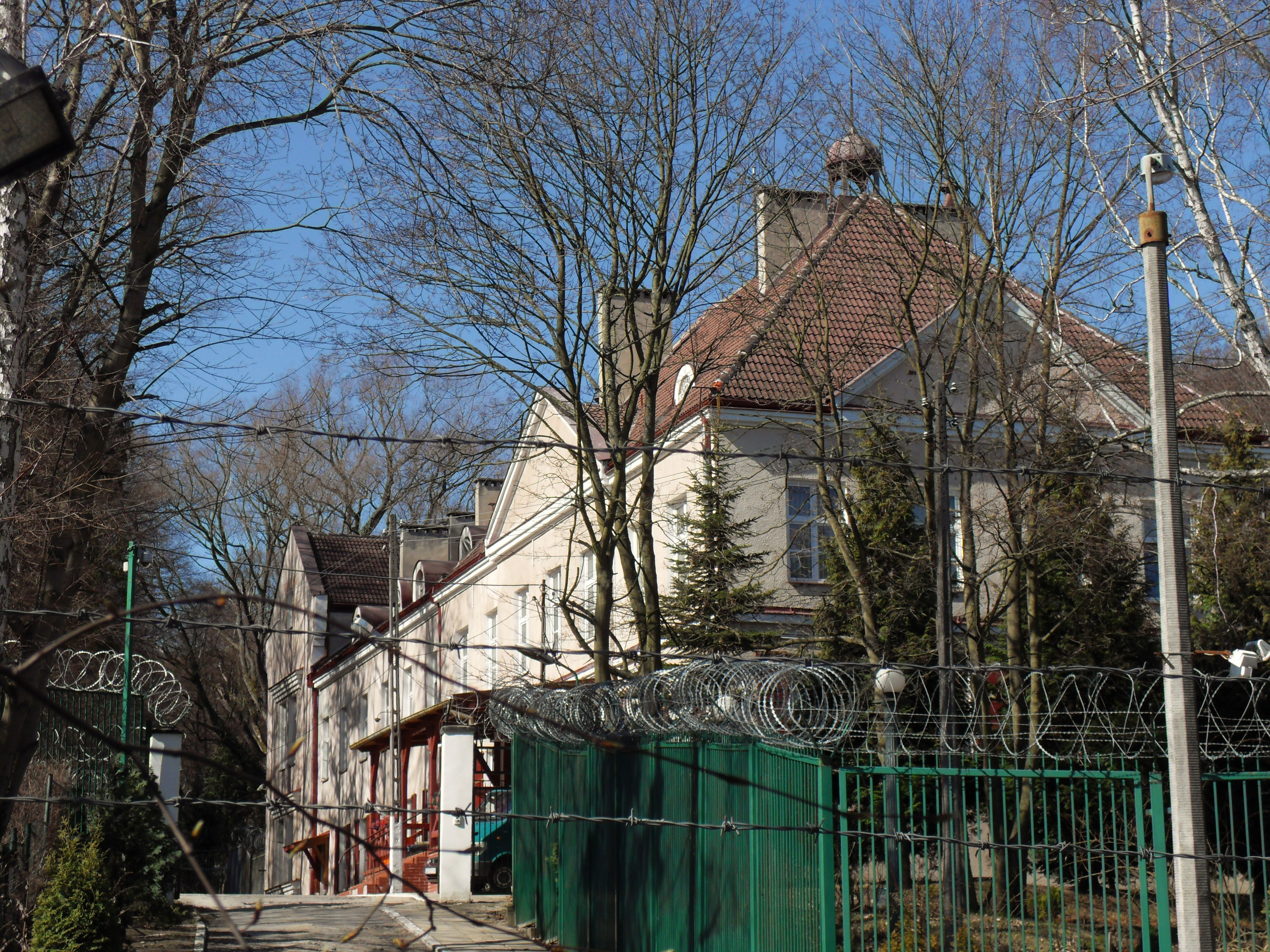 Gdańsk Oliwa, III Dwór (budynek północny).